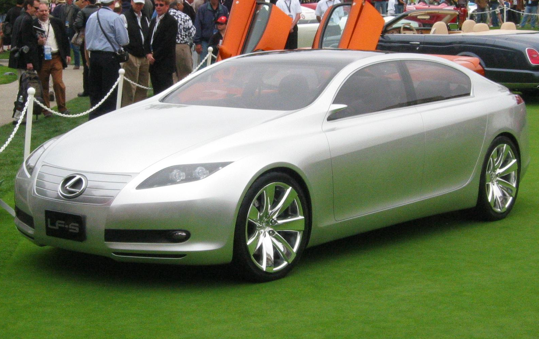 Look, Ma! No door handles! LF-S